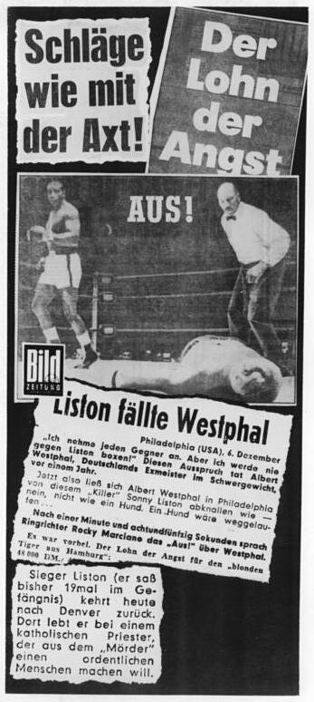 Zeitungscollage, Albert Westphal, Charles Liston Zentralbild Repro 6.12.1961 Mehr Krampf als Kampf Wieder ist ein westdeutscher Profi-Boxer "verheizt" worden: Der Hamburger Albert Westphal (Schwergewicht) wurde am 4.12.1961 in Philadelphia (USA) nach 1:58 min. von dem 19 x vorbestraften Amerikaner Liston so schwer angeschlagen, dass er drei Minuten bewußtlos war. Als Arbeitsmaterial zu verwenden.